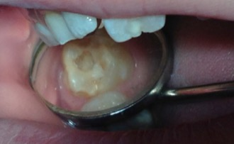 Vista clínica de una lesion de hipomineralización con cavidad en un moler d eun niño de 8 años.